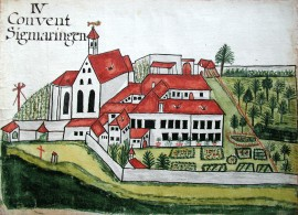 Franziskanerkloster Hedingen, Mitte des 18. Jahrhunderts.